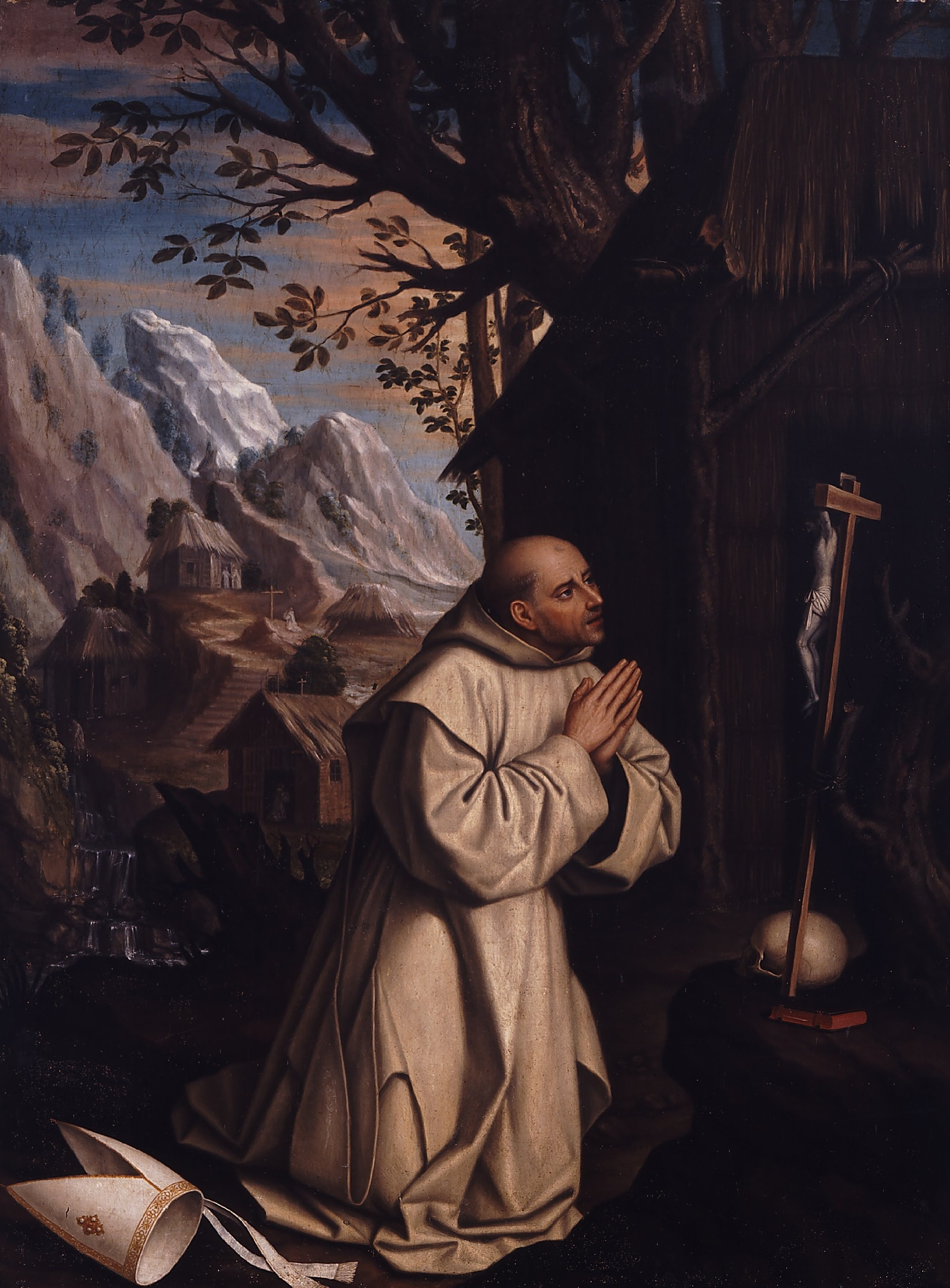 La obra representa a San Bruno de Colonia, el fundador de la Orden de los Cartujos.